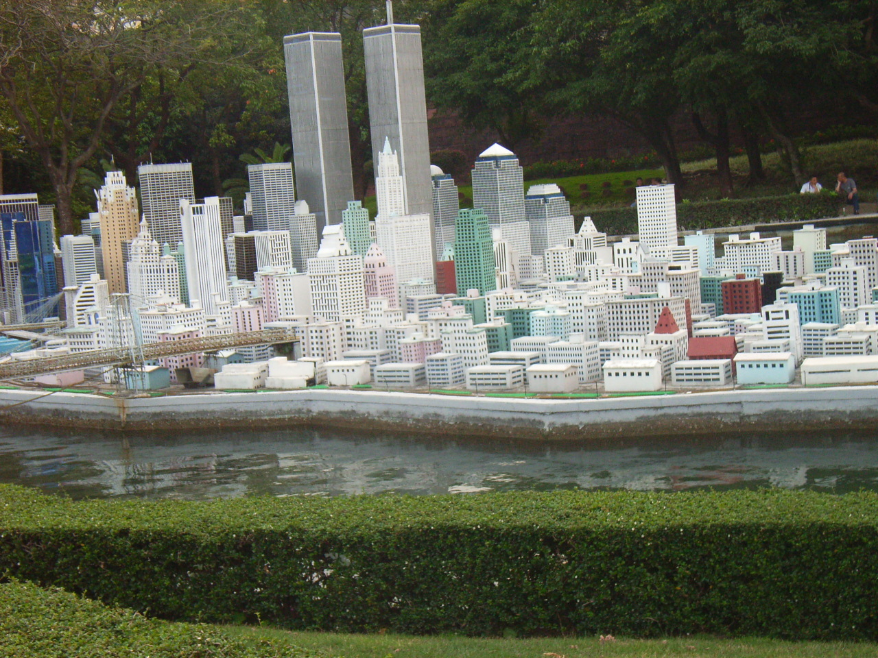 深圳zh:華僑城世界之窗 模型紐約城